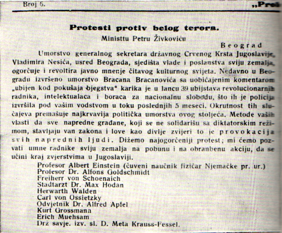 Srpskohrvatski / српскохрватски: Protest protiv belog (reakcionarnog) terora u Jugoslaviji upućen ministru Petru Živkoviću od strane istaknutih svetskih intelektualaca, među kojima i naučnik Albert Ajnštajn. Protest je objavljen u "Proleteru" 1. decembra 1929. godine, u jeku šestojanuarske diktature, kada je međunarodna javnost već saznala za mnogobrojna politička ubistva protivnika diktatorskog režima u Jugoslaviji, uključujući 39 istaknutih komunista.